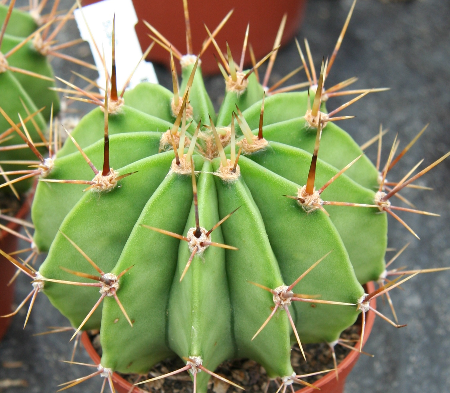 Echinopsis klingleriana in der Kakteengärtnerei Haage, Erfurt